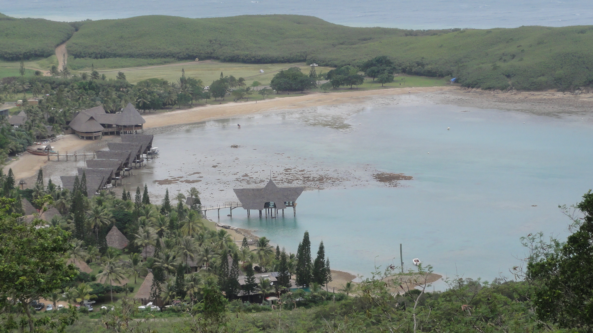 L'Anse du Kuendu et les bungalows sur pilotis de l'hôtel du Kuendu Beach